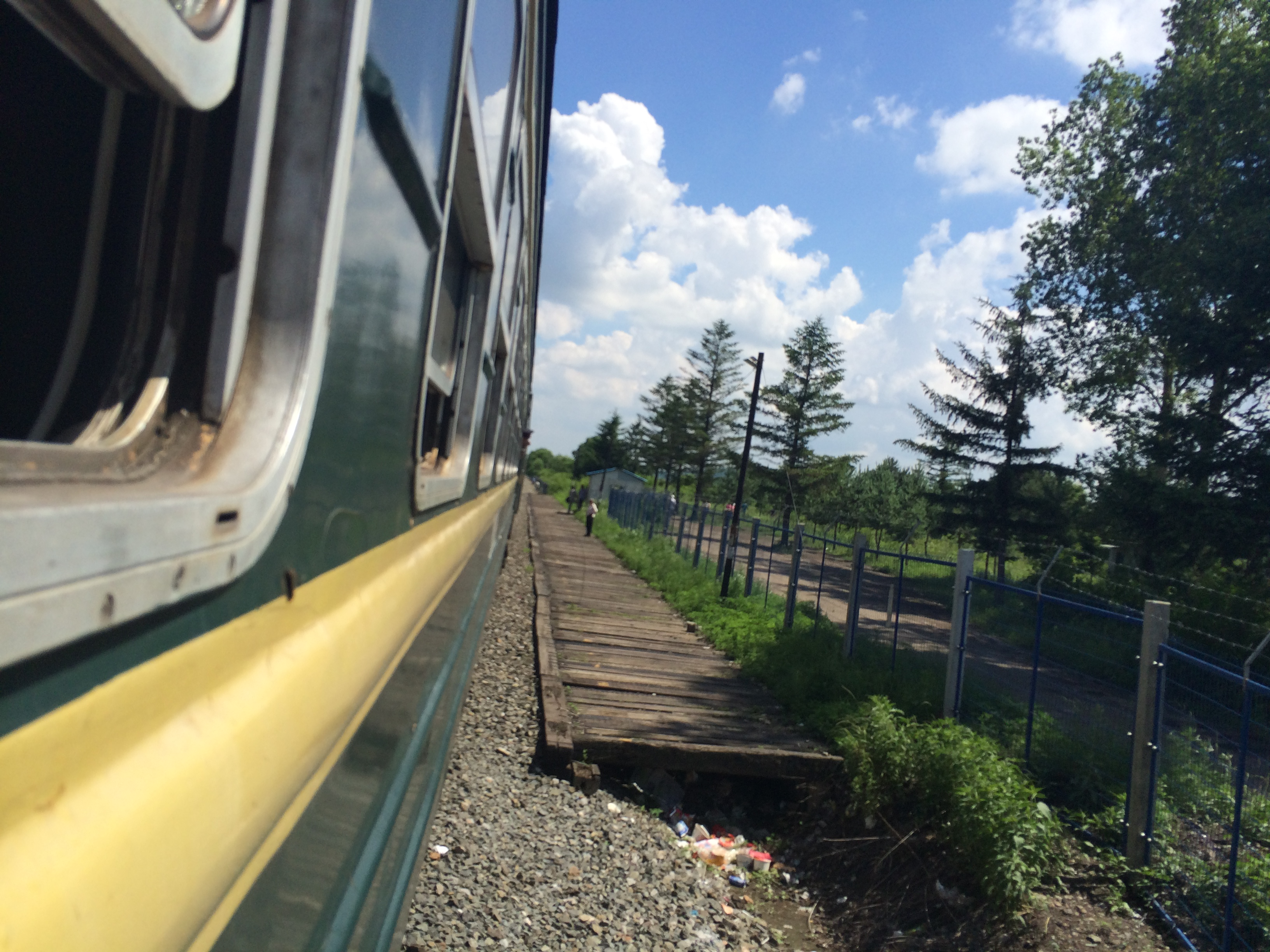 左家乘降所